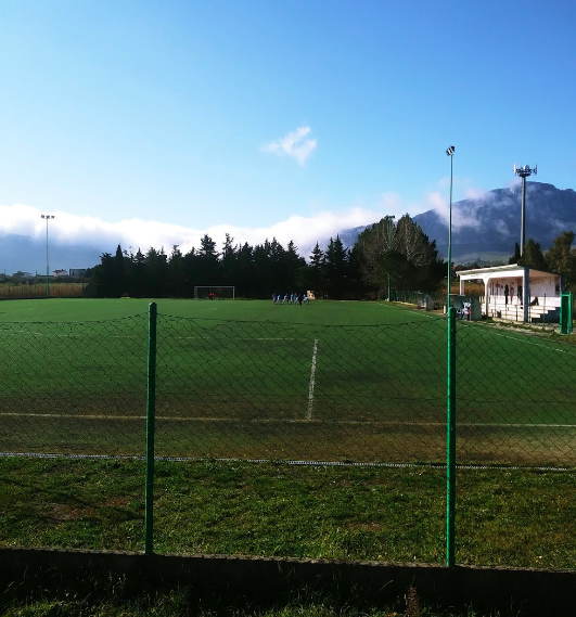 Stadio Comunale A. Li Cauli di Piana degli Albanesi, contrada Piano Cavallaro (Fusha e Kavalarit), Provincia di Palermo, Sicilia, Italia.